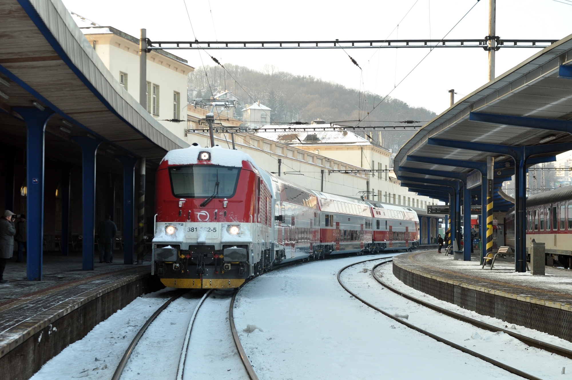 Slávnostné odovzdanie rušňa a EPJ